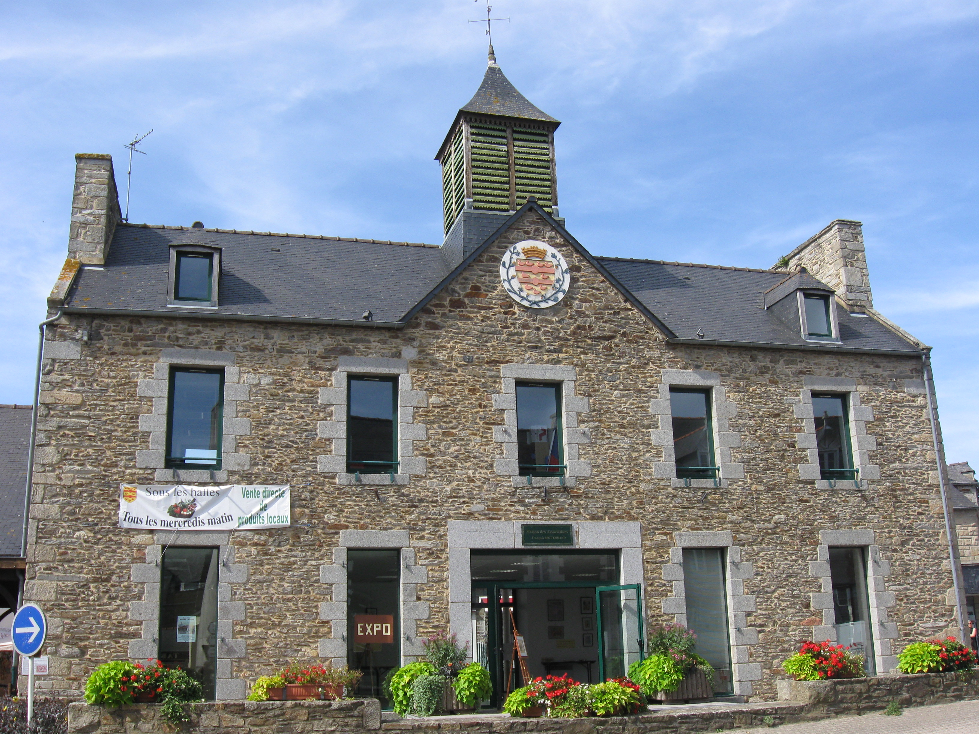 Halle de Matignon. (Côtes-d'Armor, région Bretagne).